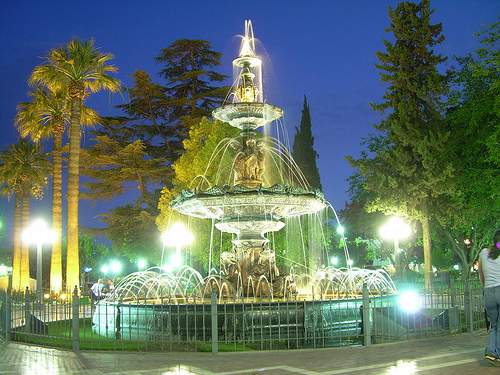 Fuente de la plaza de Maipú, Mendoza. De noche.